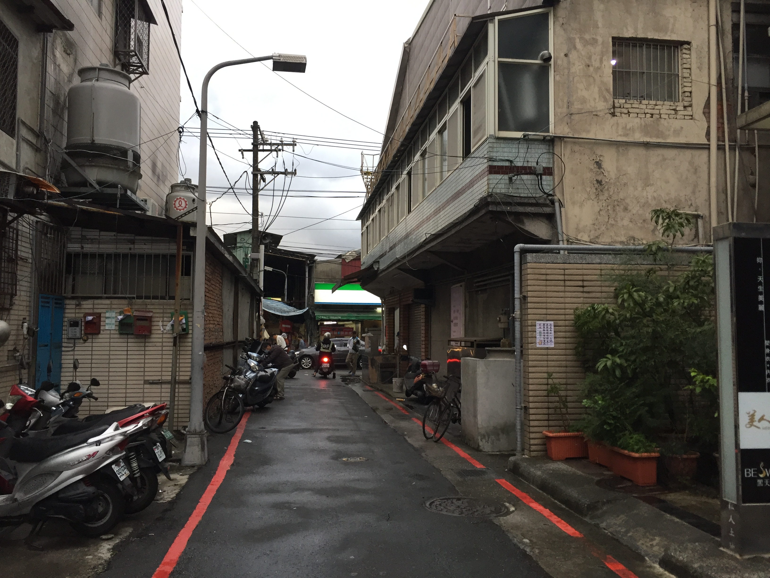 台灣台北市士林區華榮街延伸段